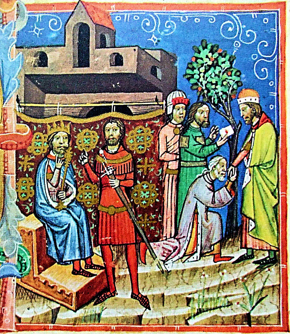 Count Vid incites Solomon of Hungary against Géza I of Hungary